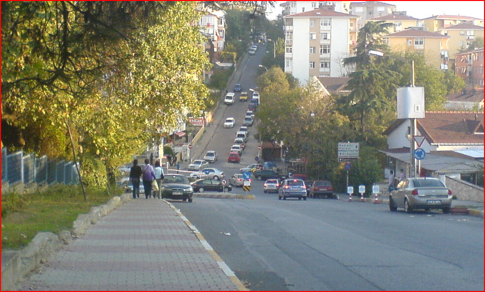 Lisans